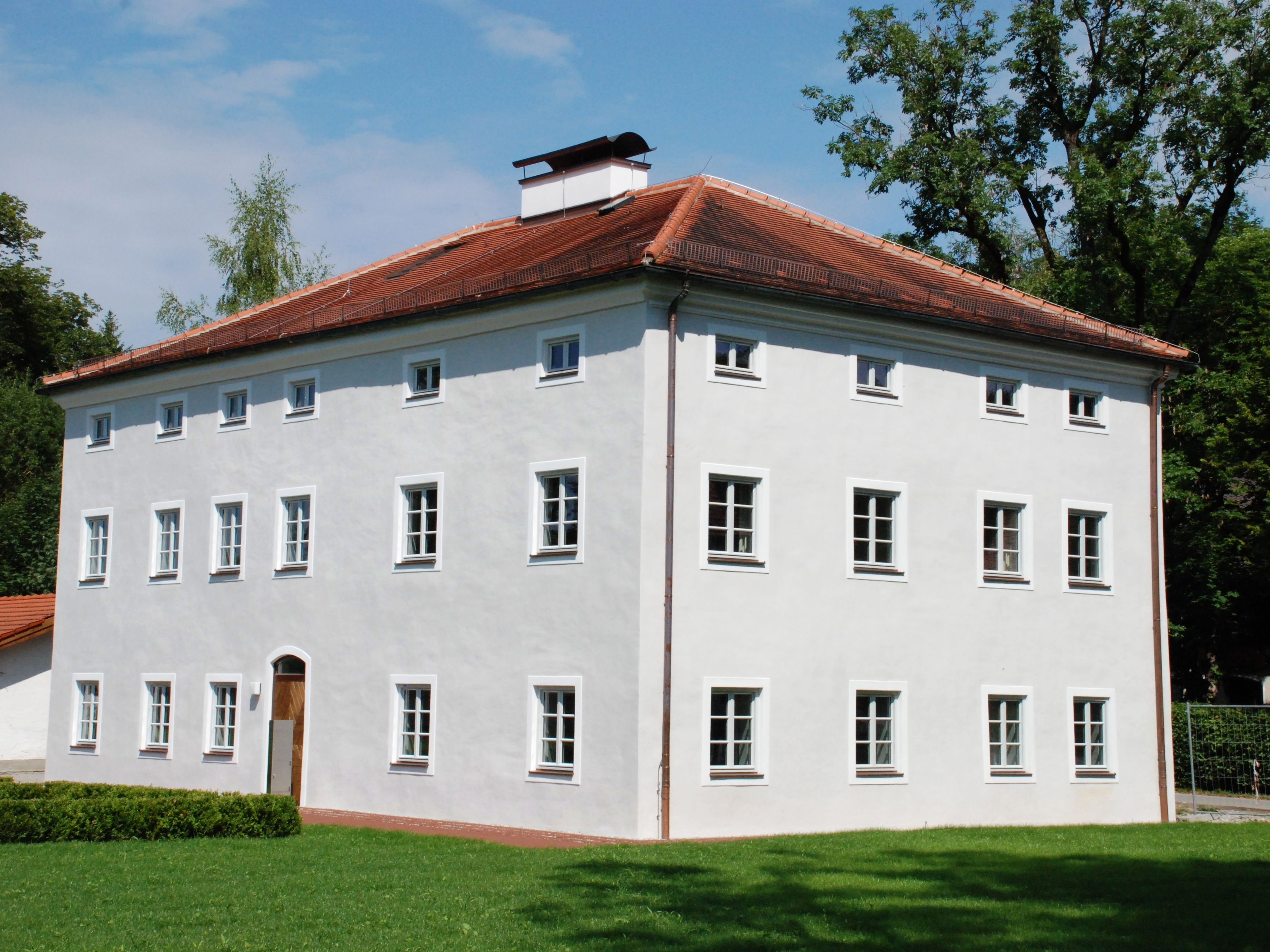 Pfarrhaus in der Münchner Straße 1 in Aying, Landkreis München, Bezirk Oberbayern, Bayern. Als Baudenkmal in der Bayerischen Denkmalliste unter Aktennummer D-1-84-137-5 aufgeführt. Laut Denkmalliste im dritten Viertel des 19. Jahrhunderts errichtet, im Kern wesentlich älter. Foto gemäß den Voraussetzungen zur Panoramafreiheit von öffentlicher Verkehrsfläche aus aufgenommen.